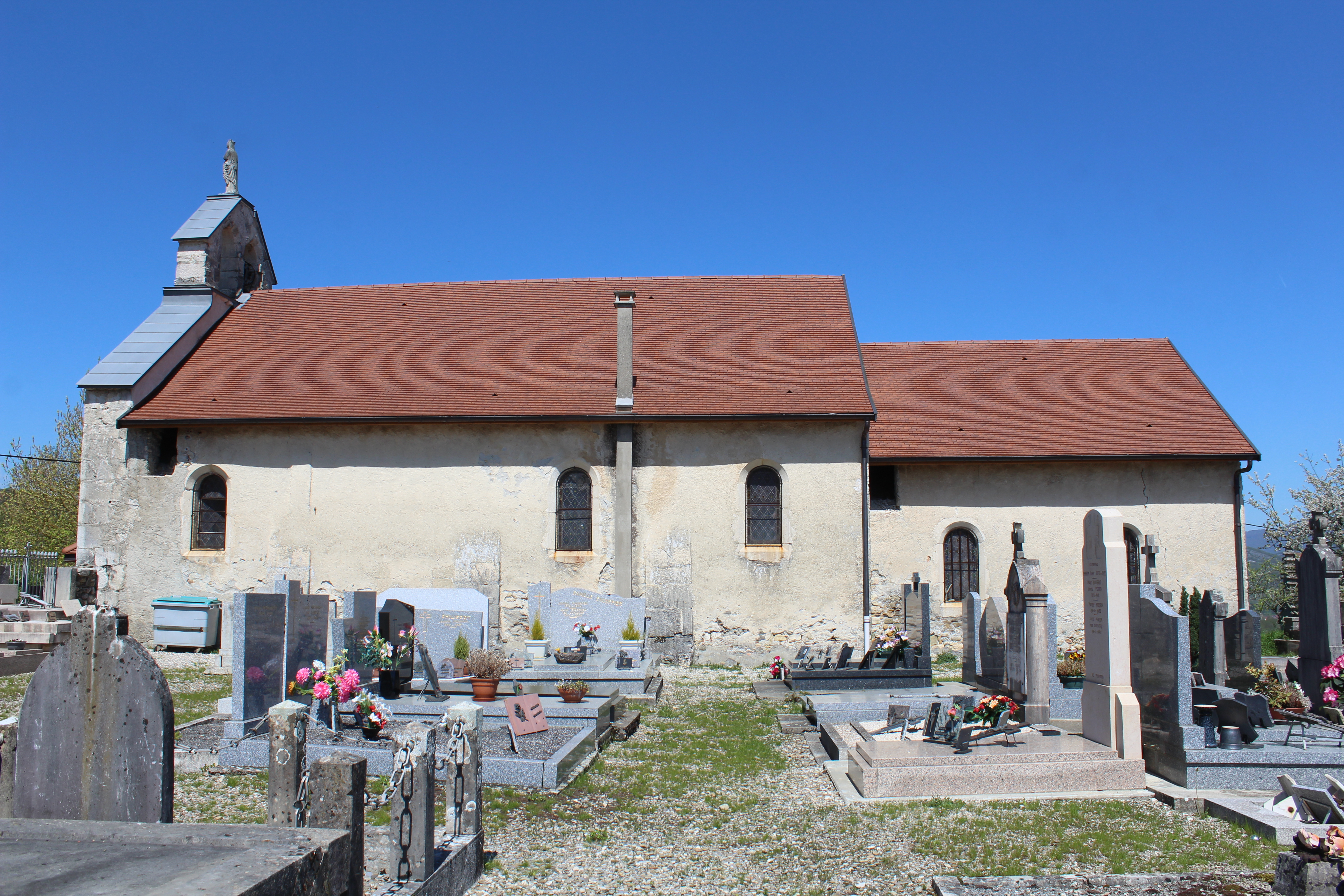 Église Saint-Pierre de Nattages, Parves-et-Nattages.